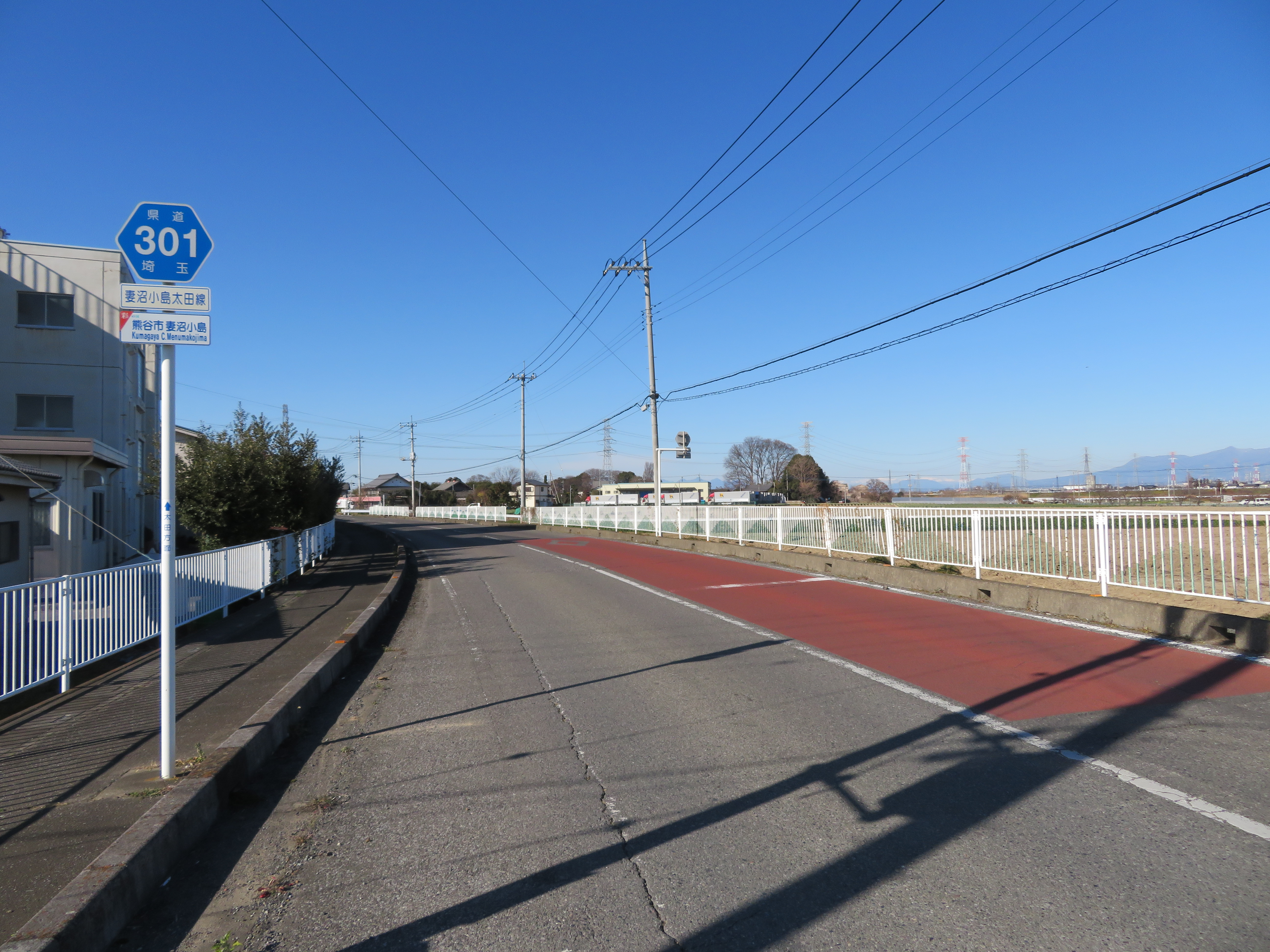 埼玉県道83号線熊谷市妻沼小島付近（太田方面を撮影） Canon PowerShot SX720 HS